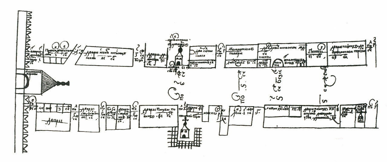 План улицы Покровки 1669 года с изображением Покровских ворот Белого города. Белокуров, 1898. С. 24-25.